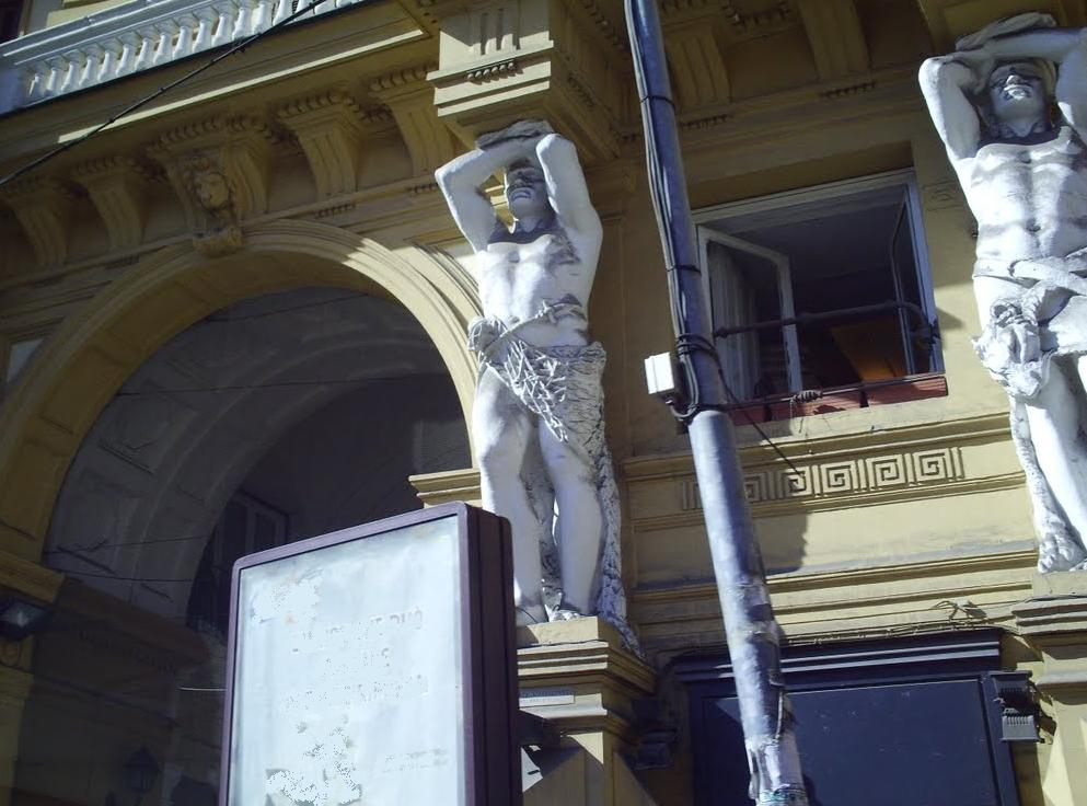 Piazza Nicola Amore (o Piazza 4 Palazzi) di Napoli. Uno dei 4 Palazzi monumentali.